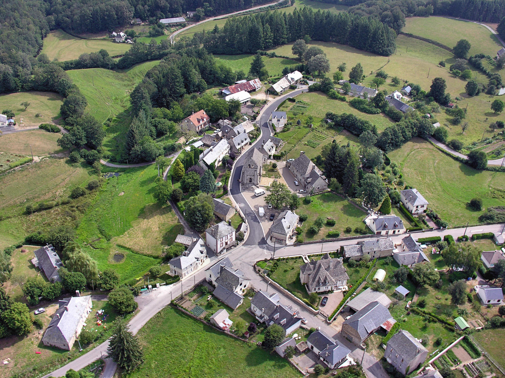 Vue aérienne de Champagnac-la-Noaille